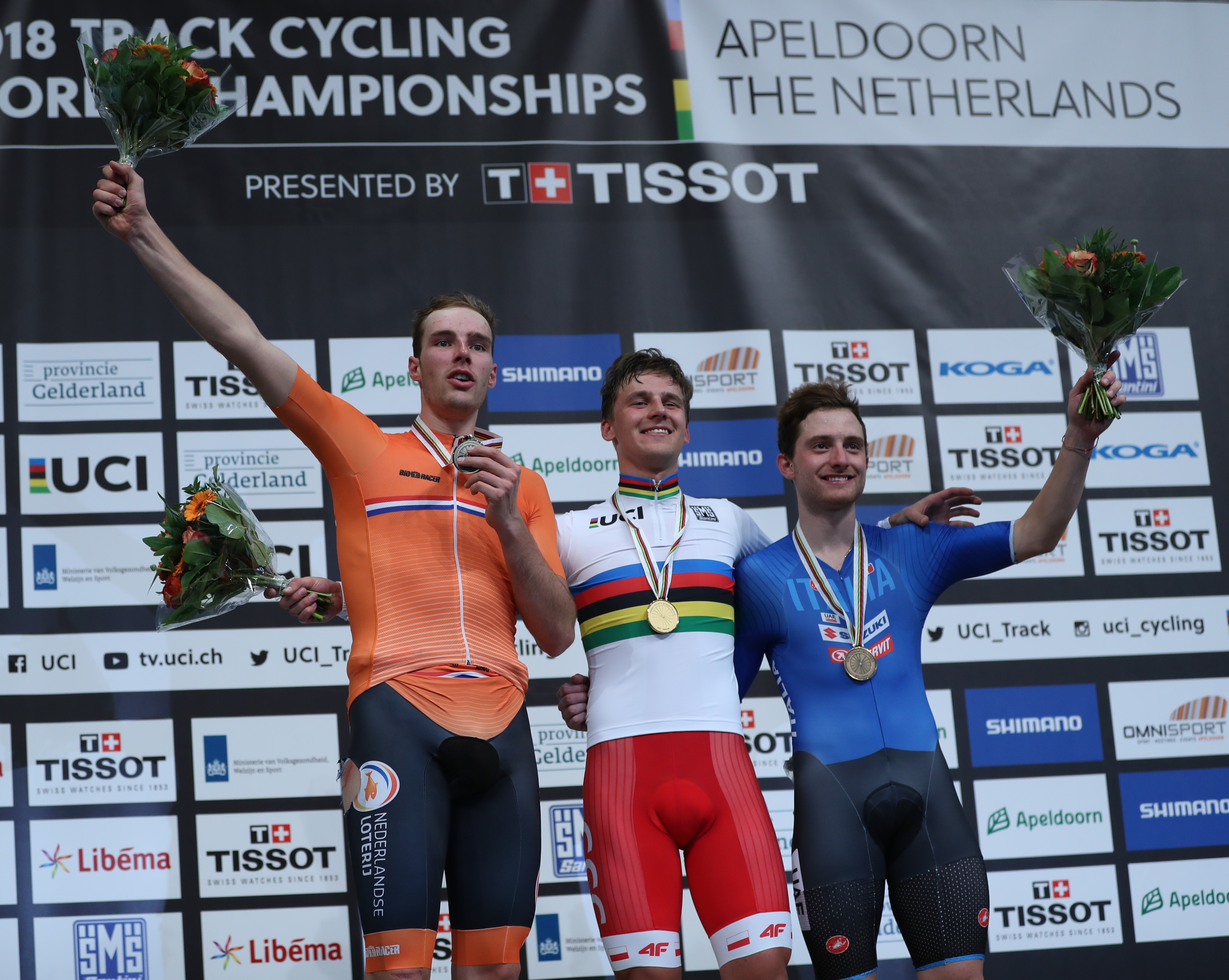 Podium Omnium: Jan-Willem van Schip, Szymon Sajnok, Simone Consonni